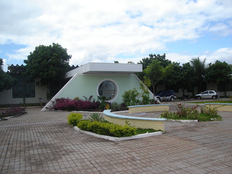 UFRR